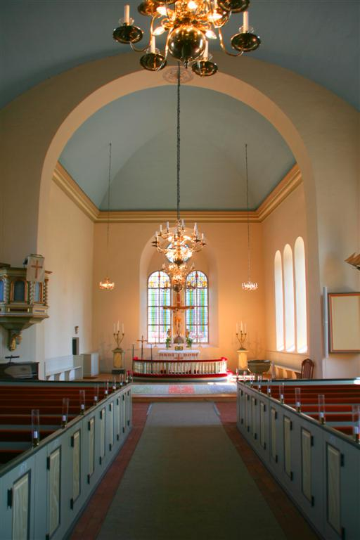 Foto: Tor Svensson